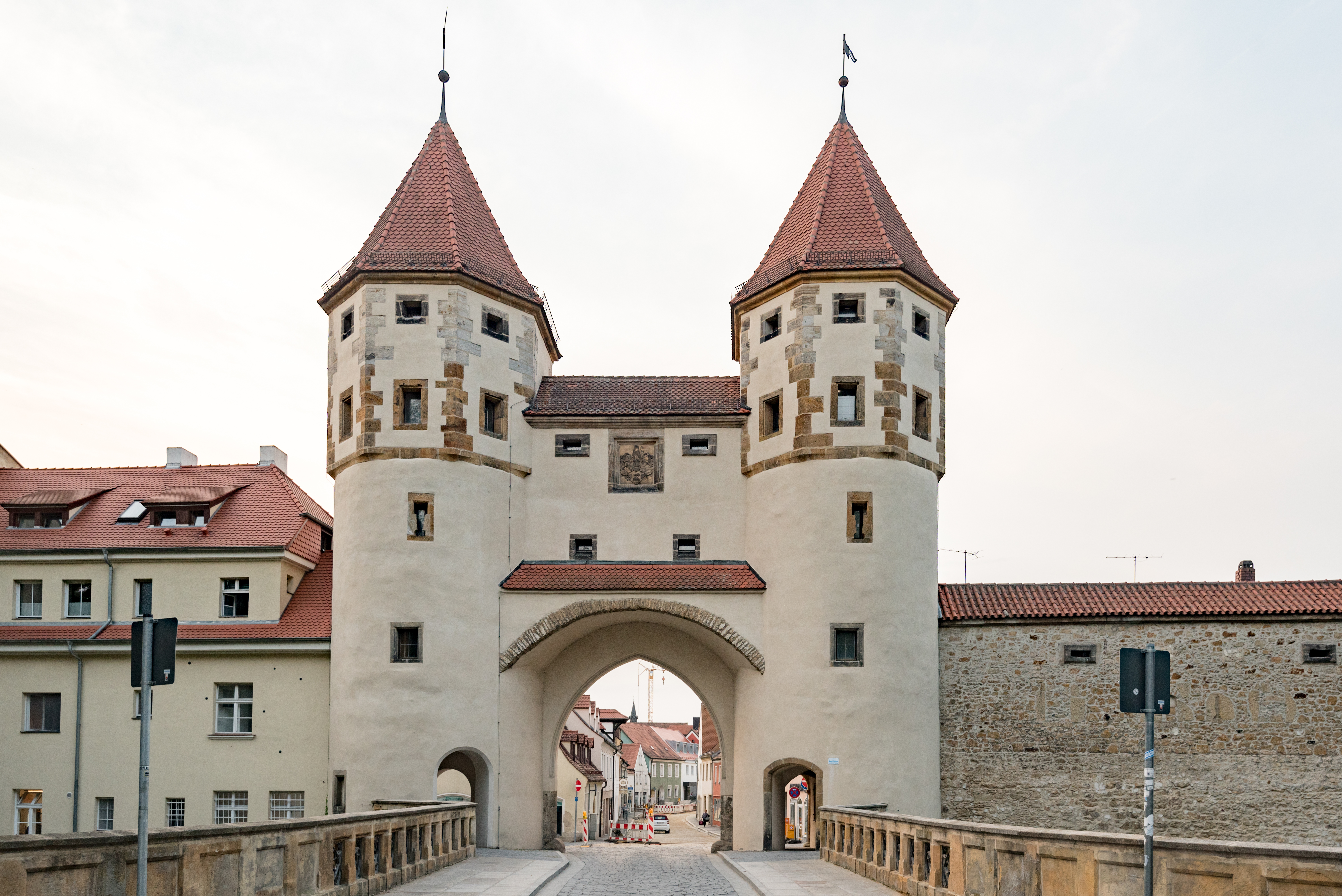 Amberg, Stadtbefestigung, Hinter der Mauer 25, Nabburger Tor